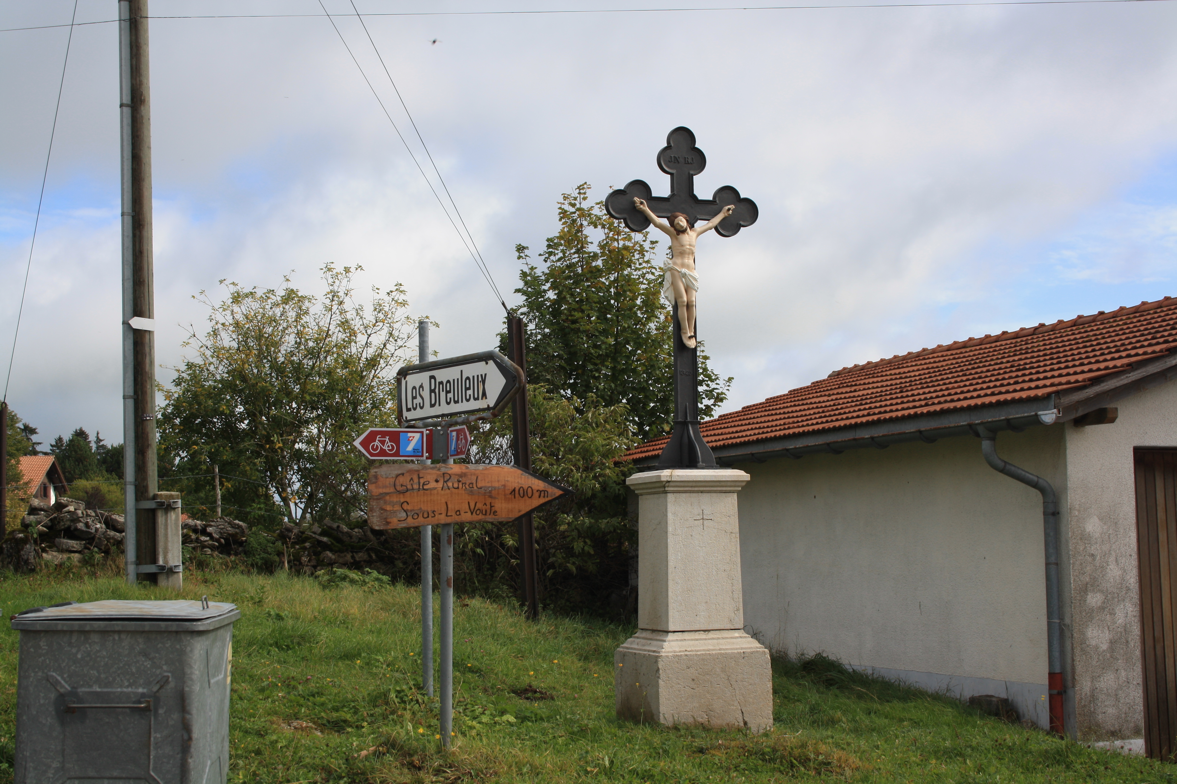 La Chaux-des-Breuleux